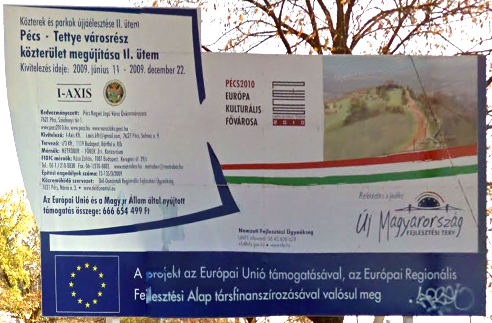 Pécs, Tettye városrész közterületének megújítását hirdető tábla